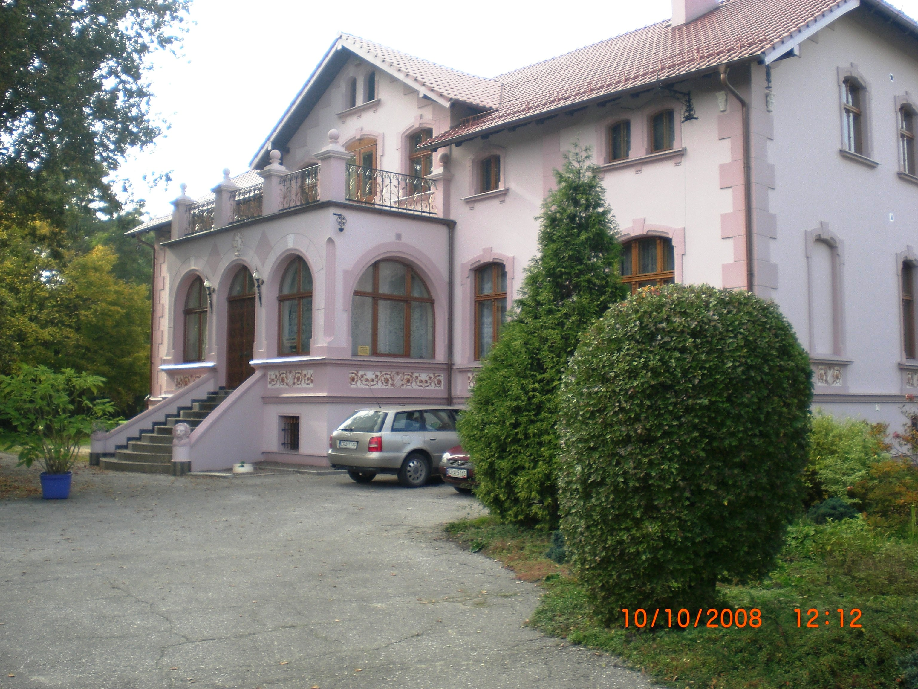 Kruśliwiec, dwór, 1910